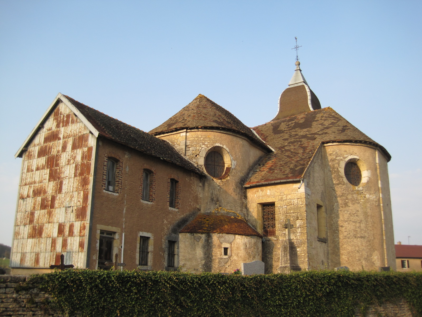 Eglise Saint-Maurice de Cirey-les-Bellevaux